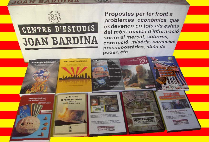 Mesa de libros del Centro de Estudios Joan Bardina